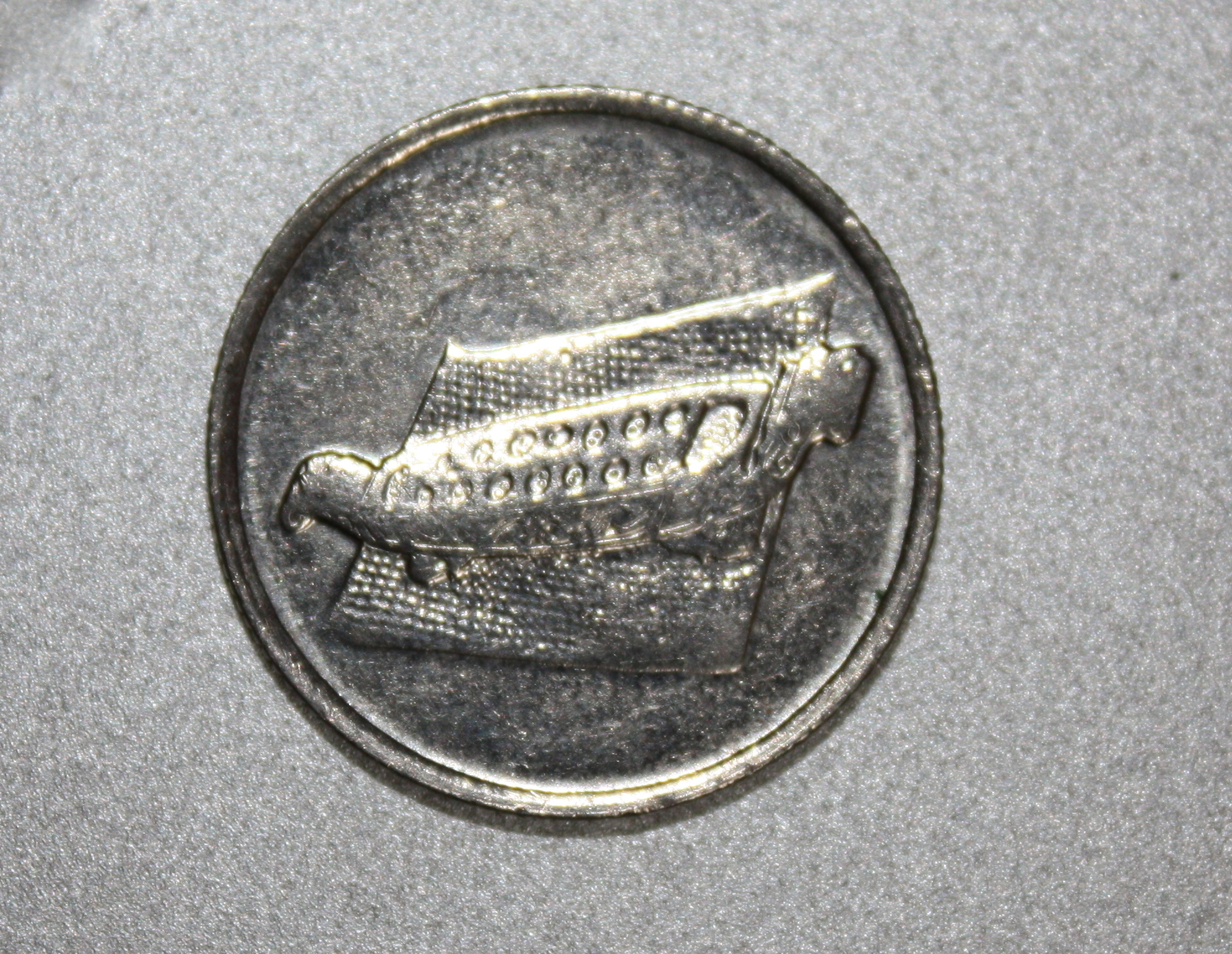 piece de 10 sen de malaisie